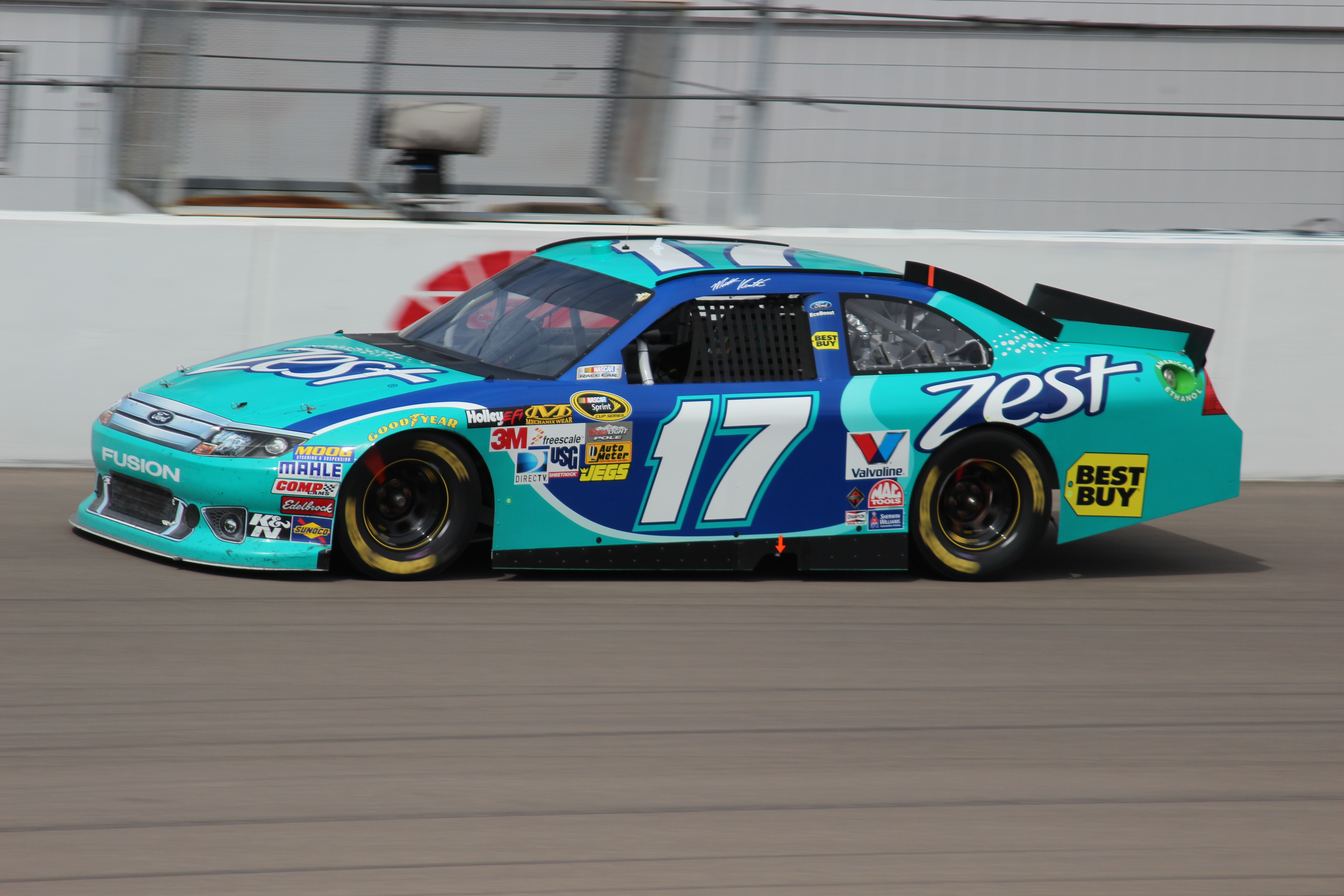 2012 Kobalt Tools 400 in Las Vegas